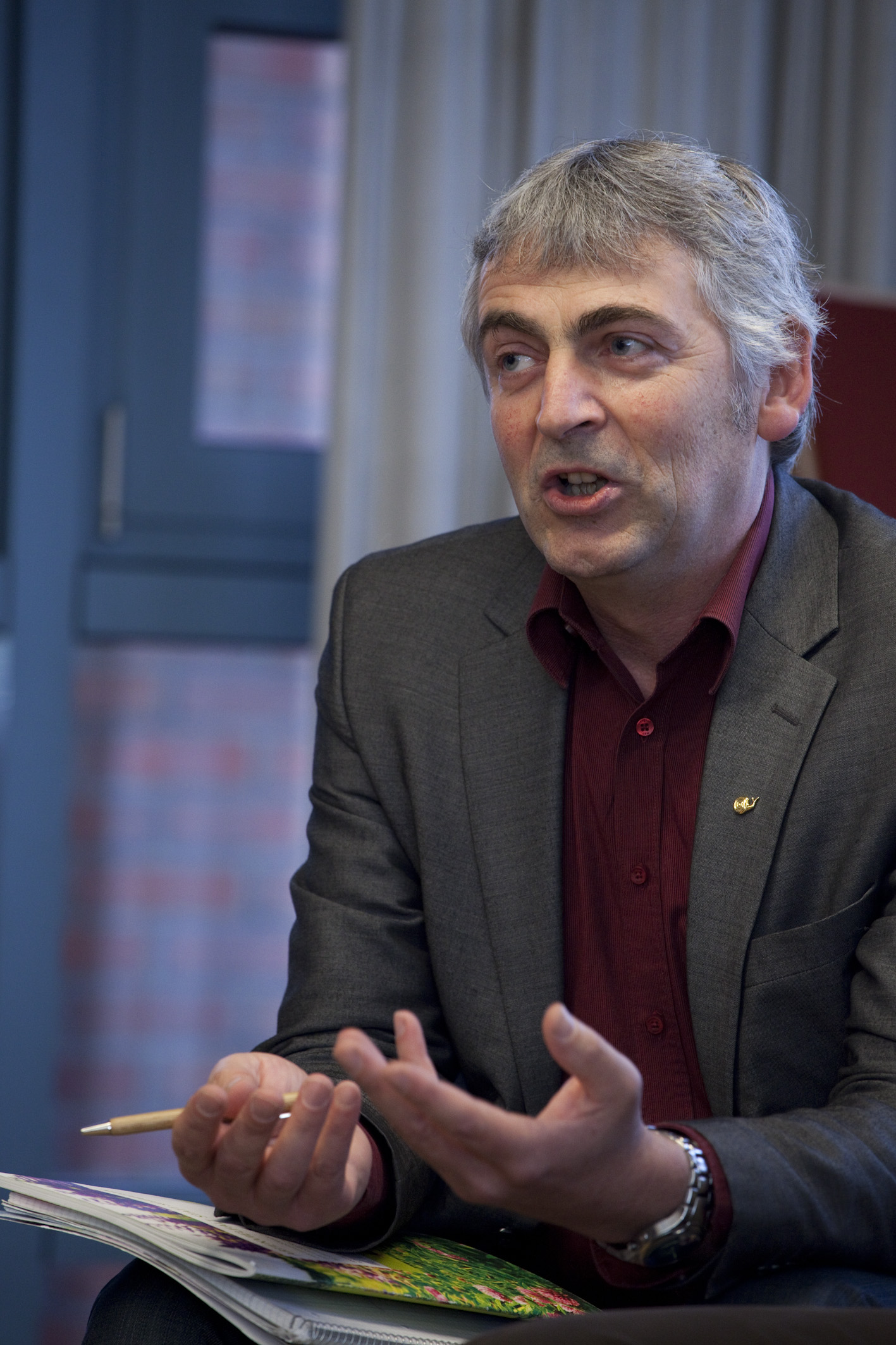 Martin Häusling, MdEP Bündnis 90/ Die Grünen, Forum "Ökolandbau und nachwachsende Rohstoffe - Zielkonflikt nachhaltiger Agrarwirtschaft?" Foto: Eva Häberle